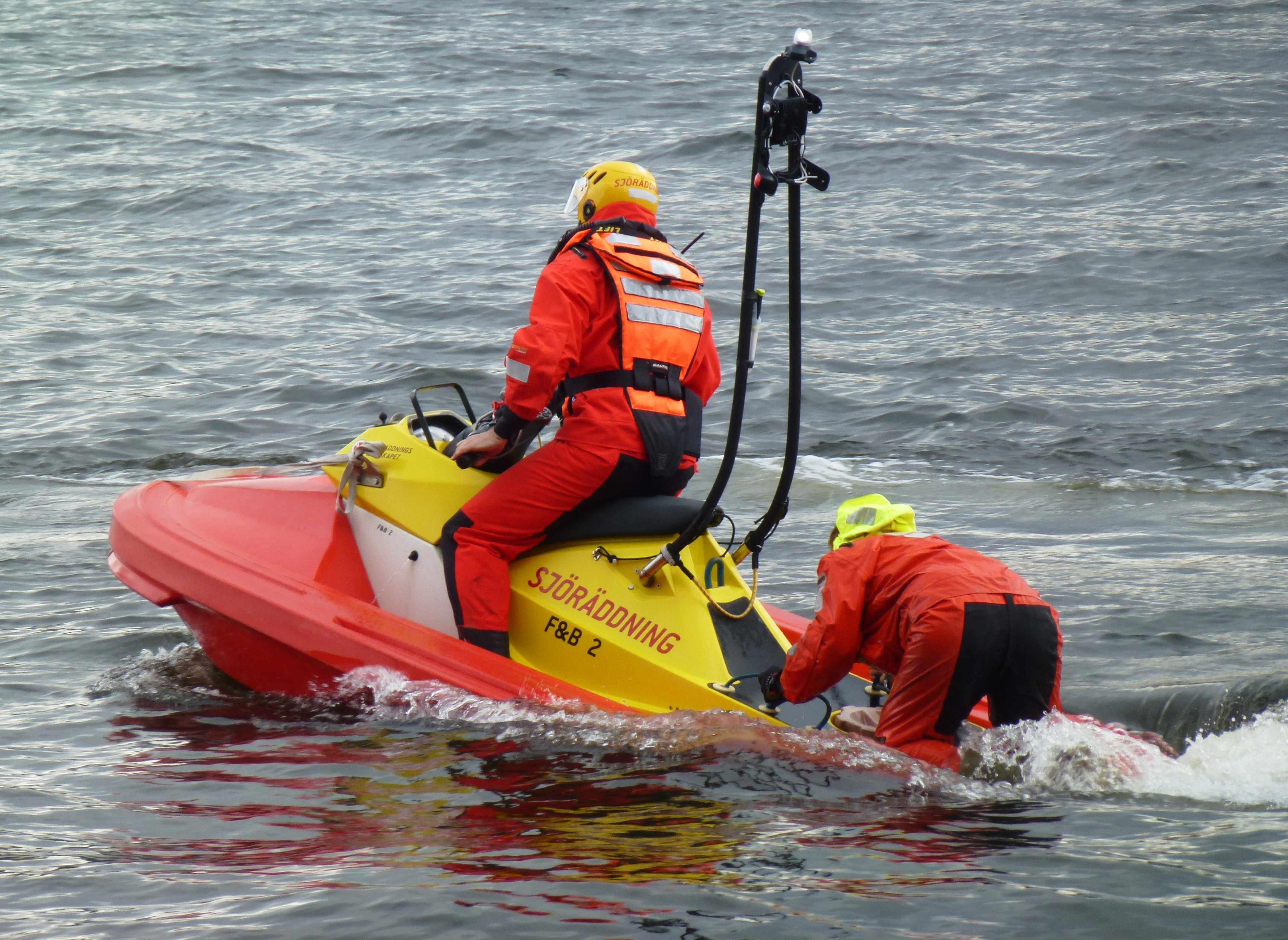 Sjöräddningsövning på Stockholms ström